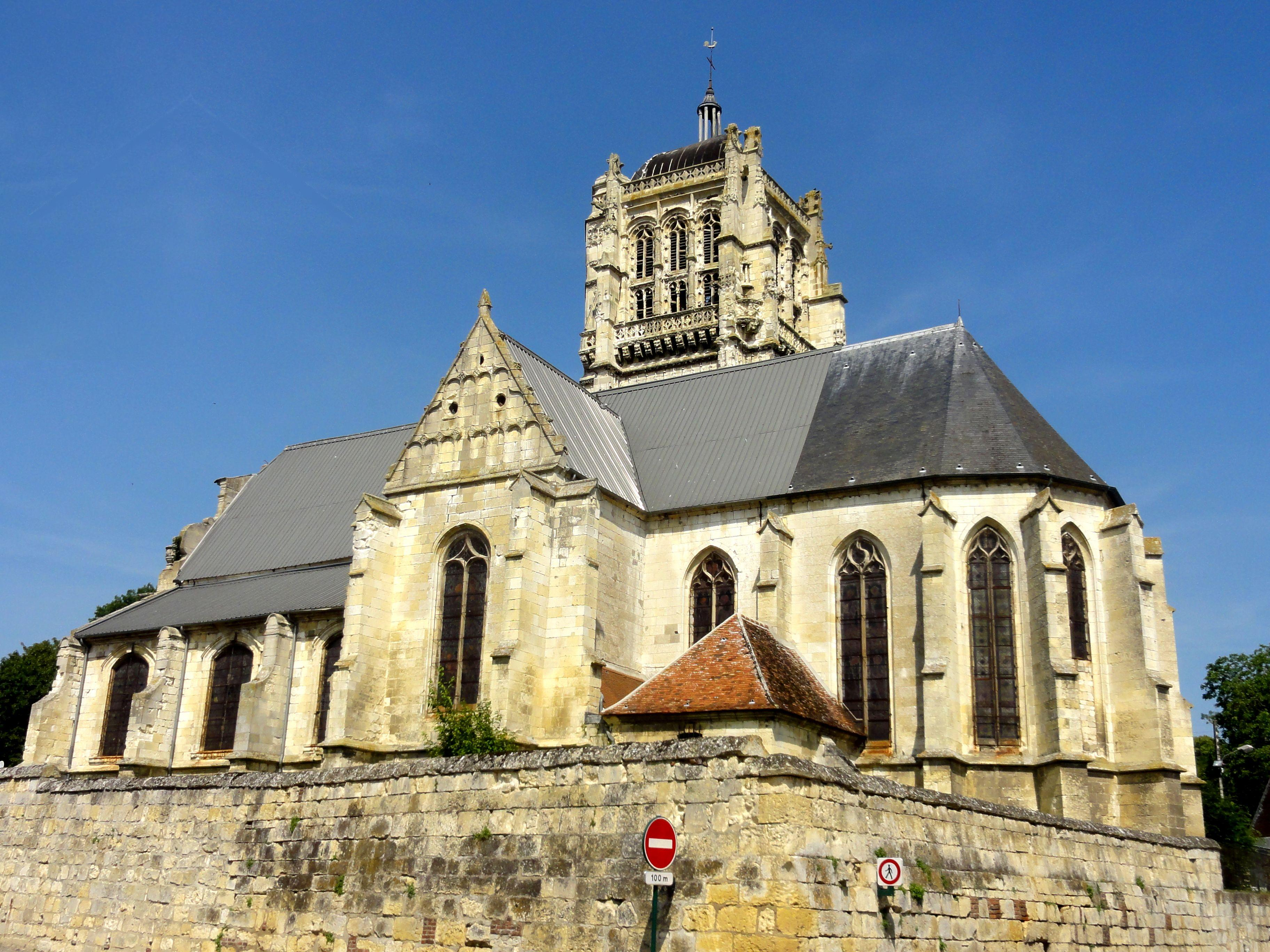 Vue depuis le sud-est.